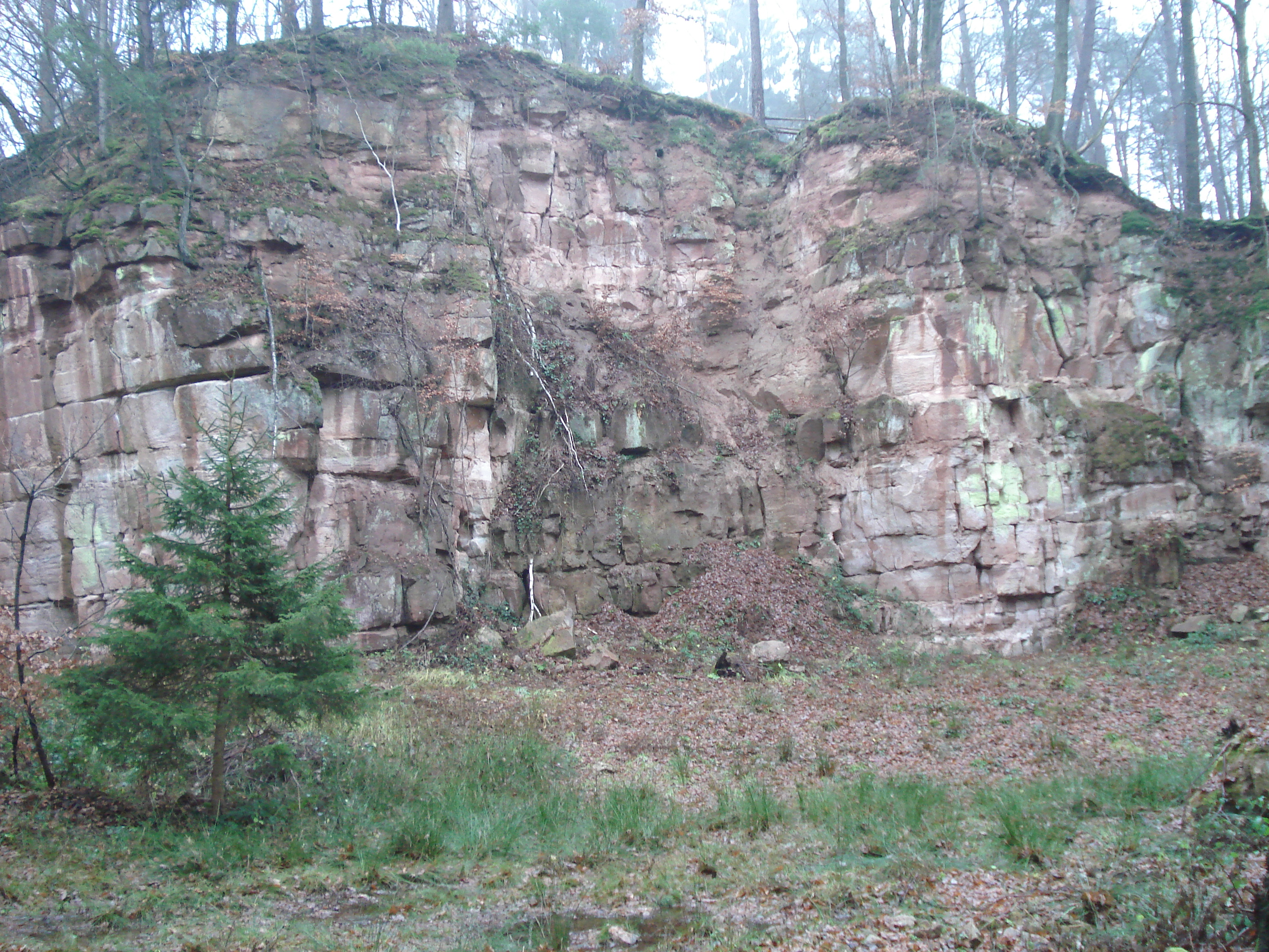 Der westliche Steinbruch auf dem Gipfel des Gräfenberges